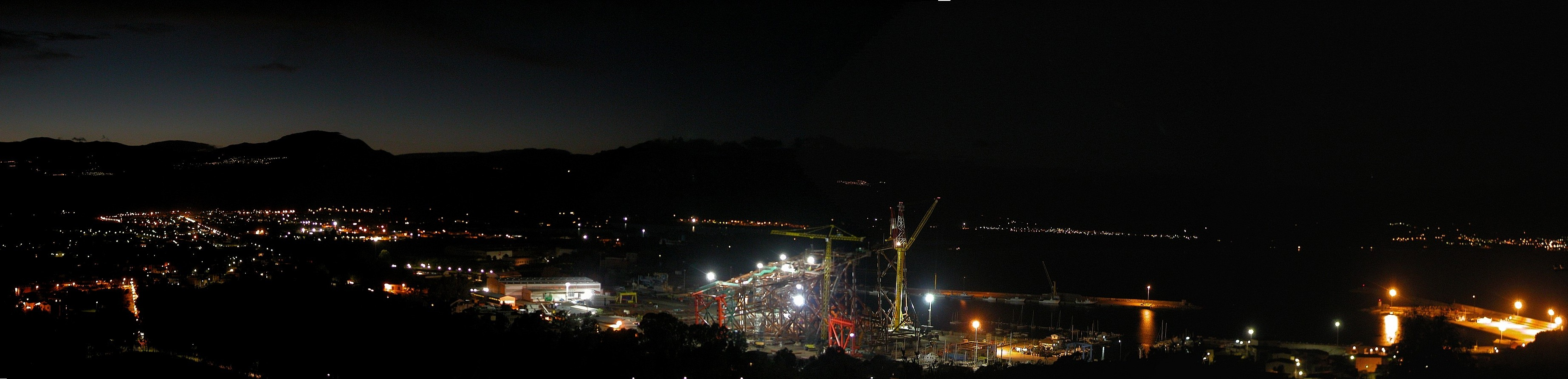 Categoria:Tortolì